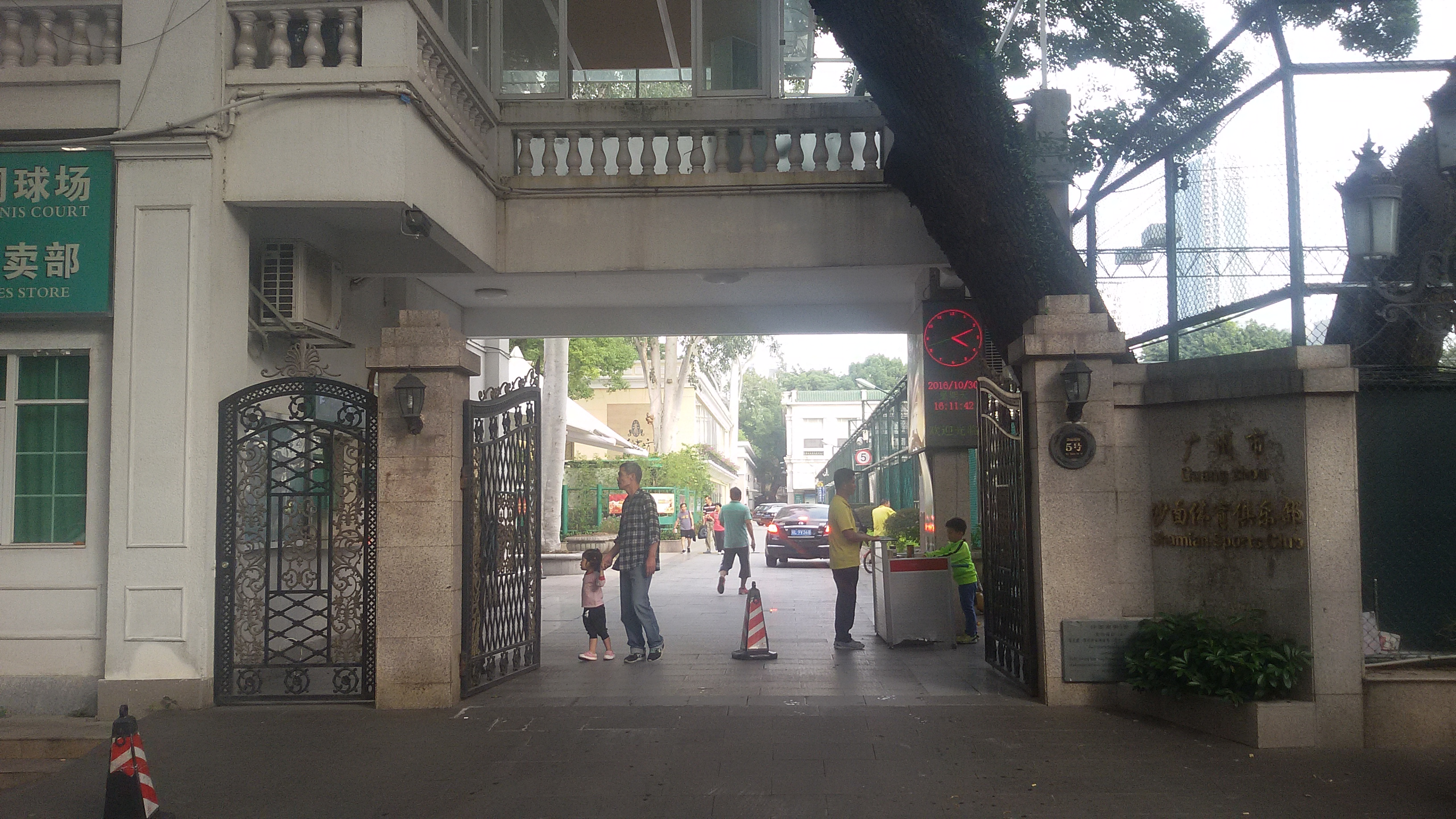 粵語: 沙面網球場